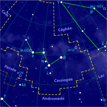 Carte pour la constellation Cassiopée Produite à l'aide du logiciel PP3